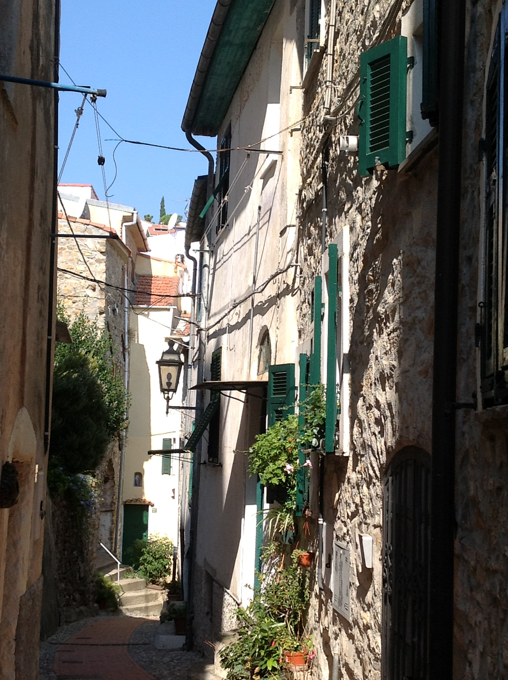 Costarainera